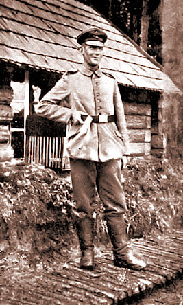 Jääkäripataljoona 27:n muonitusupseeri gruppenführer Einar Johansson.